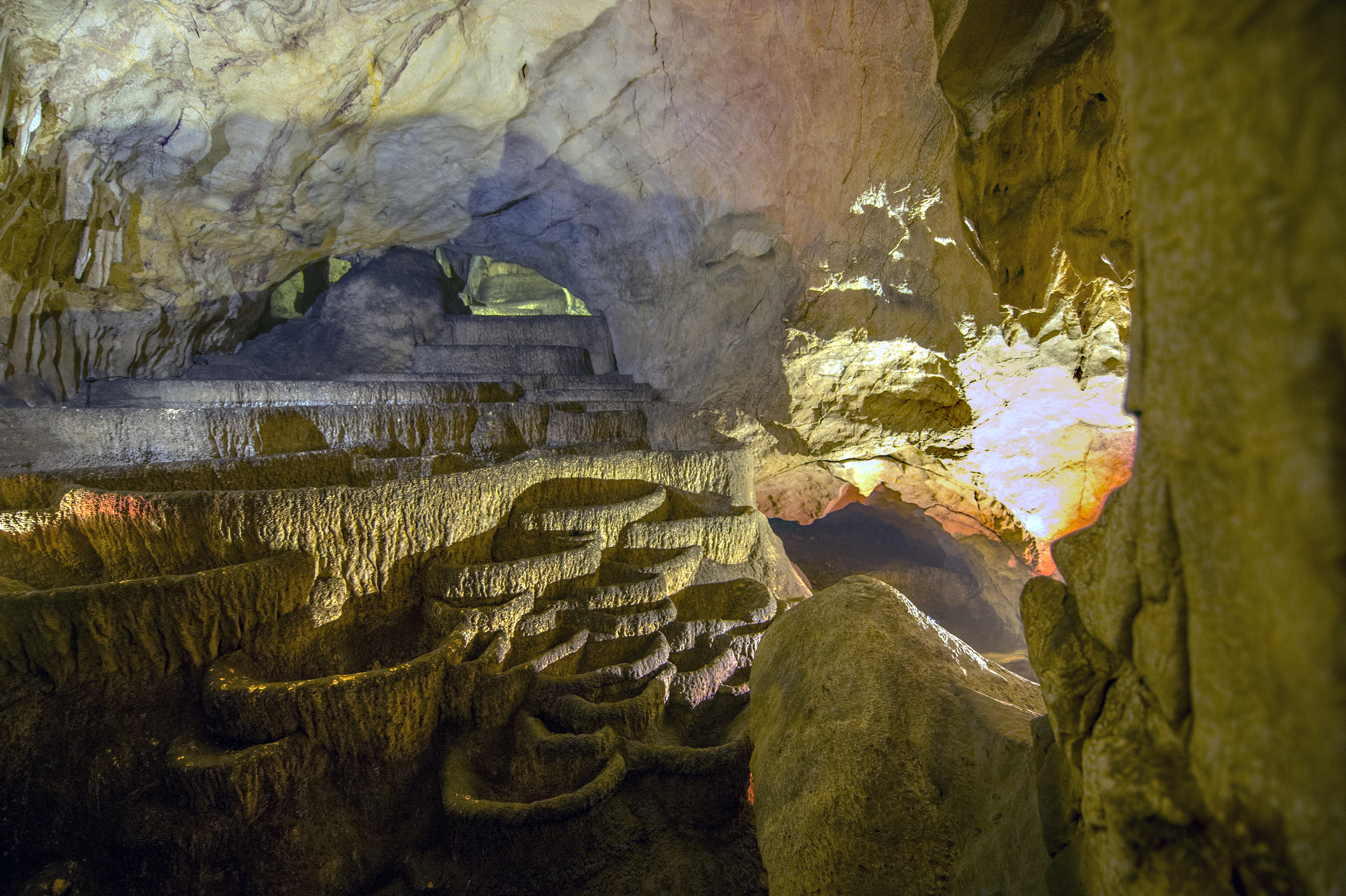 Burimi i Drinit të Bardhë dhe Shpella e Radavcit, Pejë